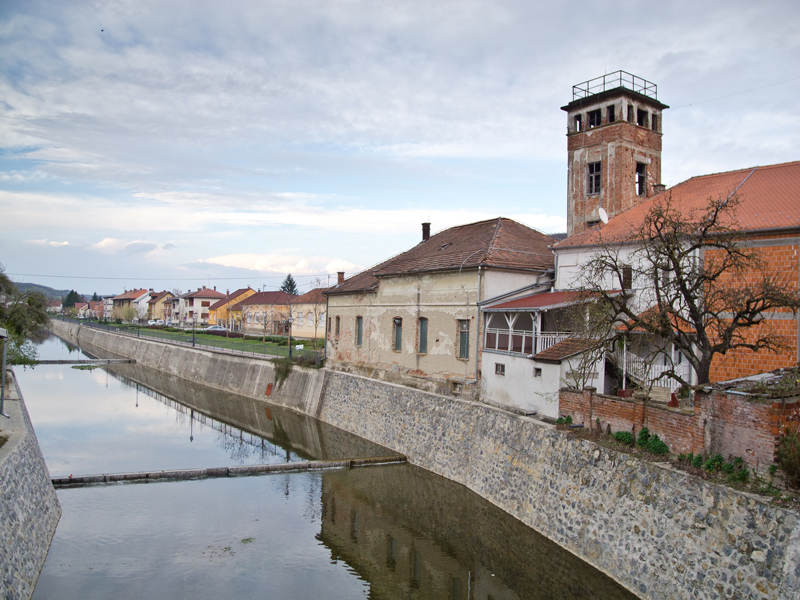 Lipik Pakra